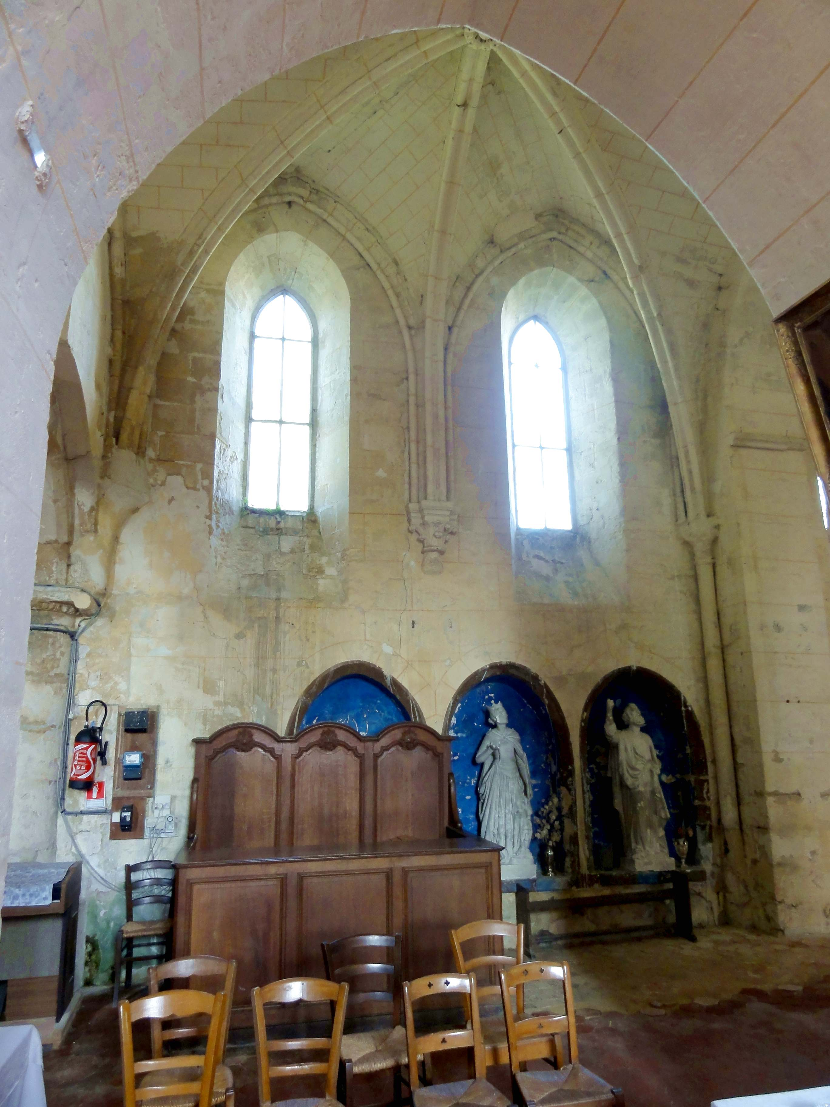 Intérieur de l'église - voir titre.